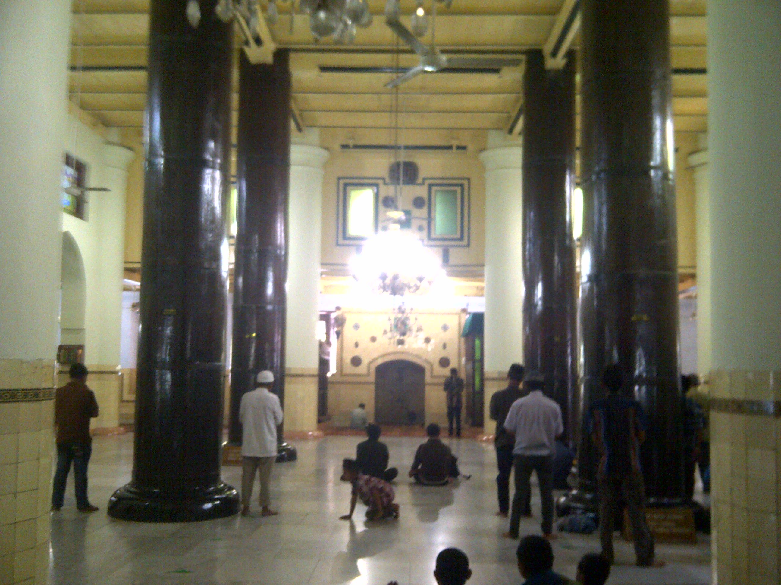 Soko Guru Mesjid Demak ""